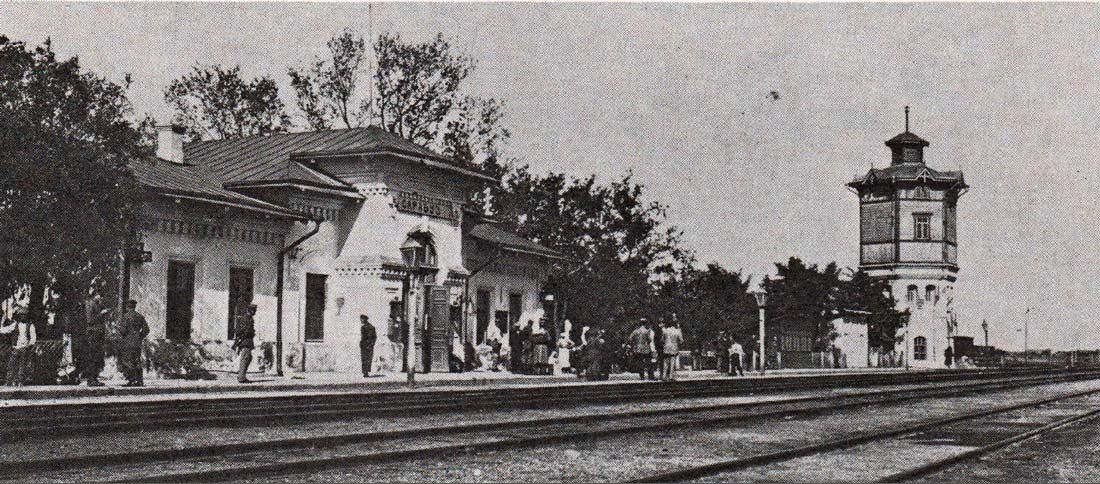 Станция Сарабуз Таврическая губерния конец XIX века